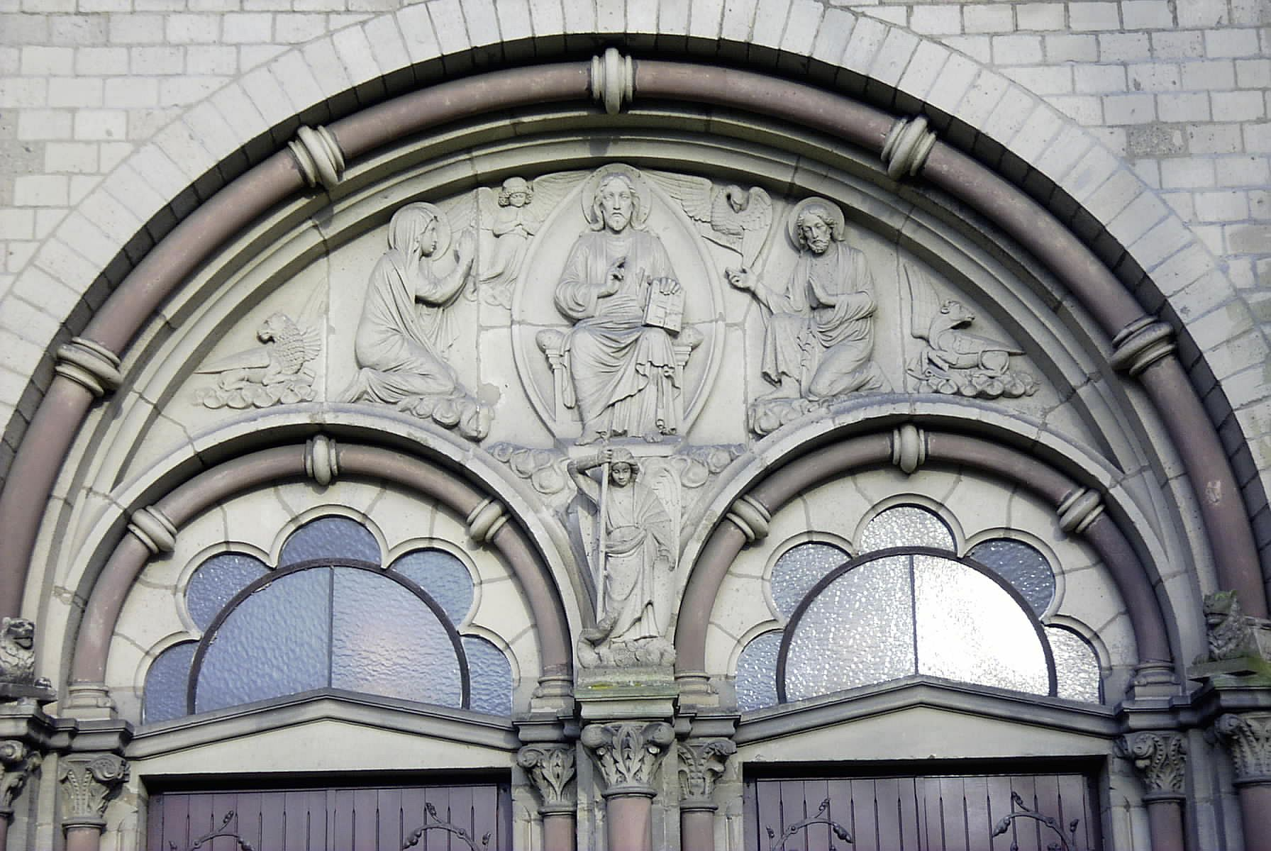 Summary Bildbeschreibung: Tympanon über dem Hauptportal der Immerather Pfarrkirche (1888-1891) Quelle: eigenes Foto Fotograf/Zeichner: bodoklecksel 20:14, 25. Mär 2006 (CET) Datum: März 2006 Sonstiges: ...